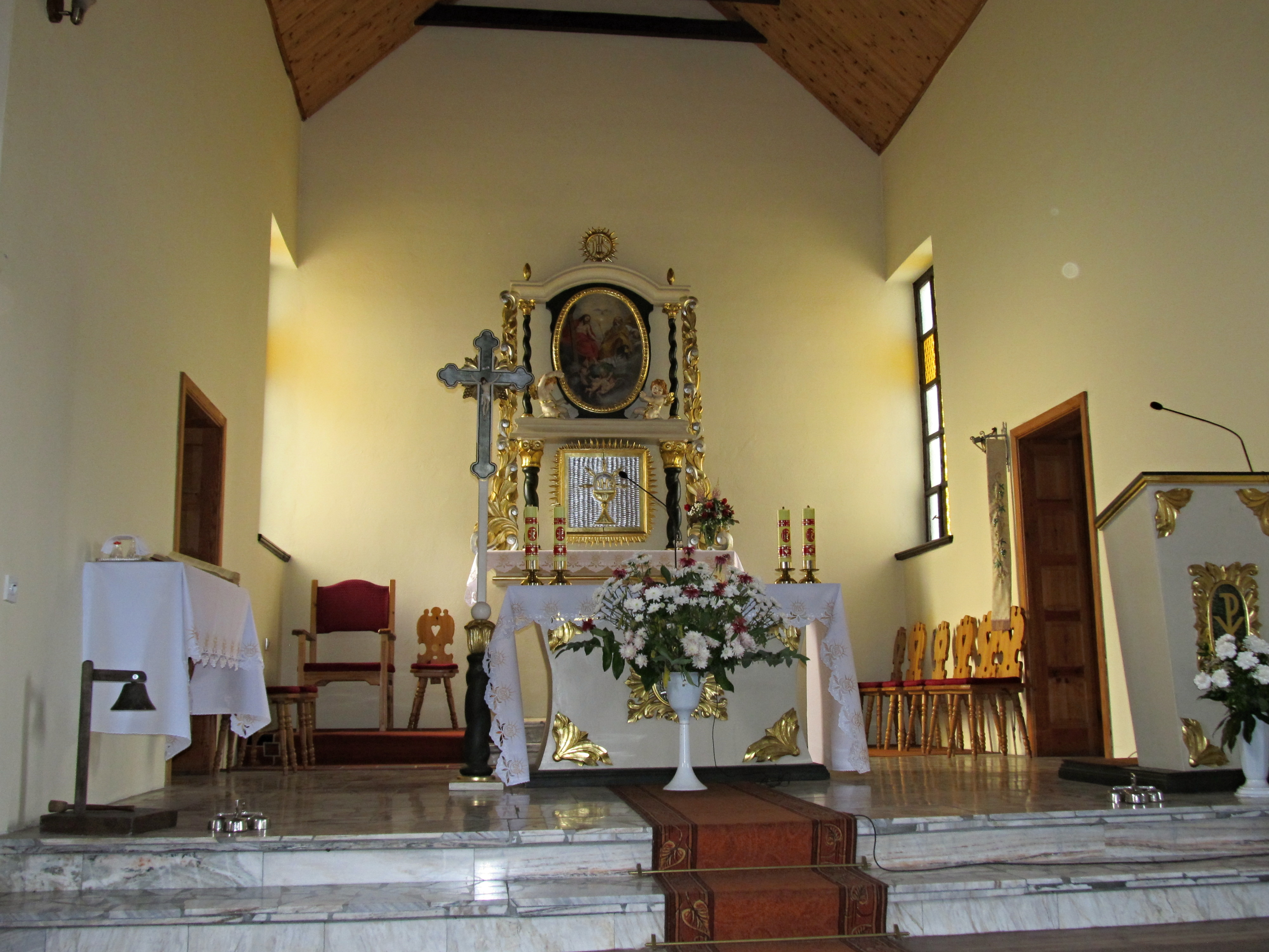 Olpuch - rzymskokatolicki kościół filialny p.w. MB Częstochowskiej